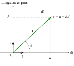 Représentation graphique du plan complexe. Auteur : Christophe Dang Ngoc Chan, réalisé avec un programme de dessin vectoriel. Licence GFDL Christophe Dang Ngoc Chan